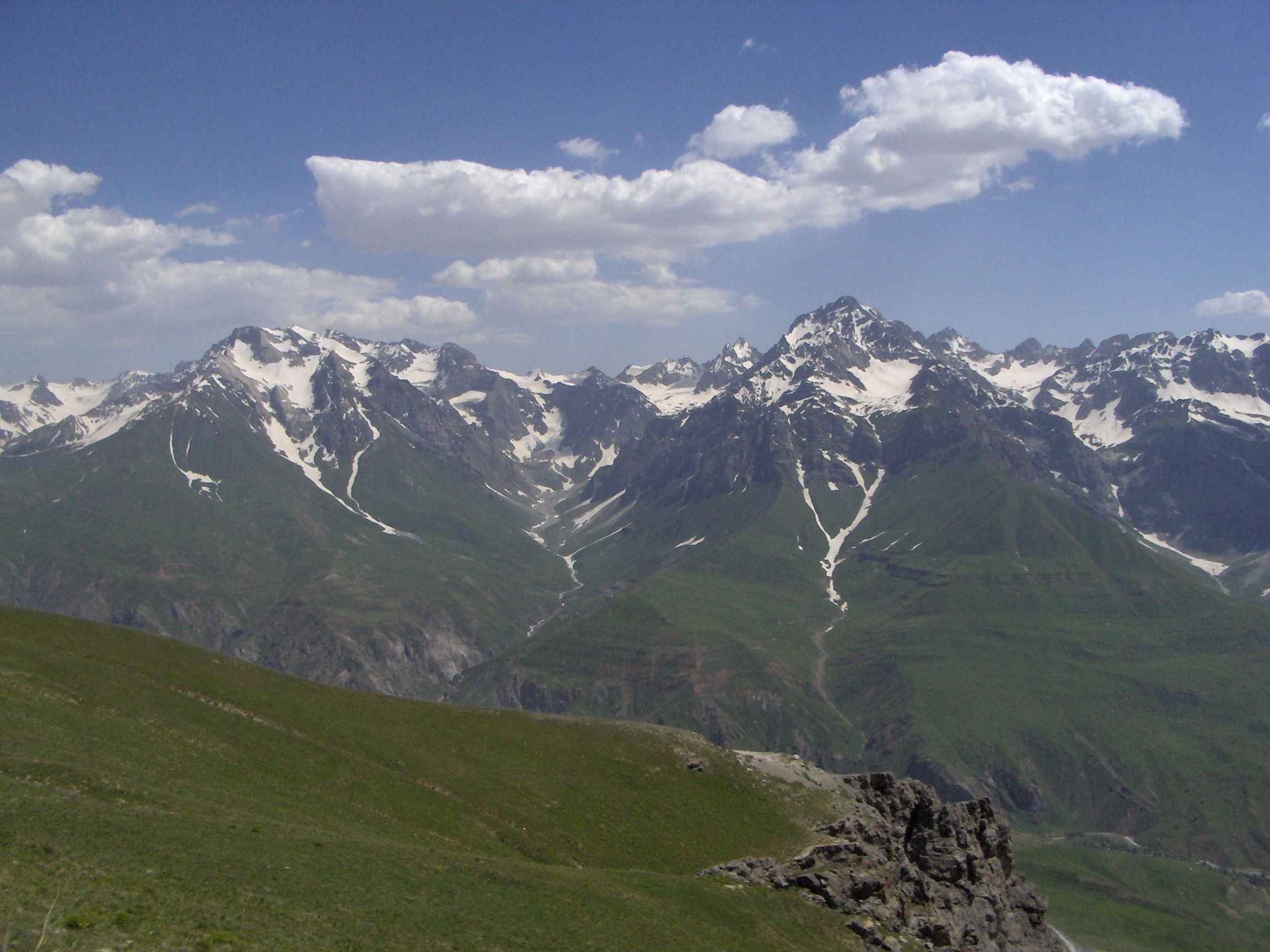 Tajik mountains